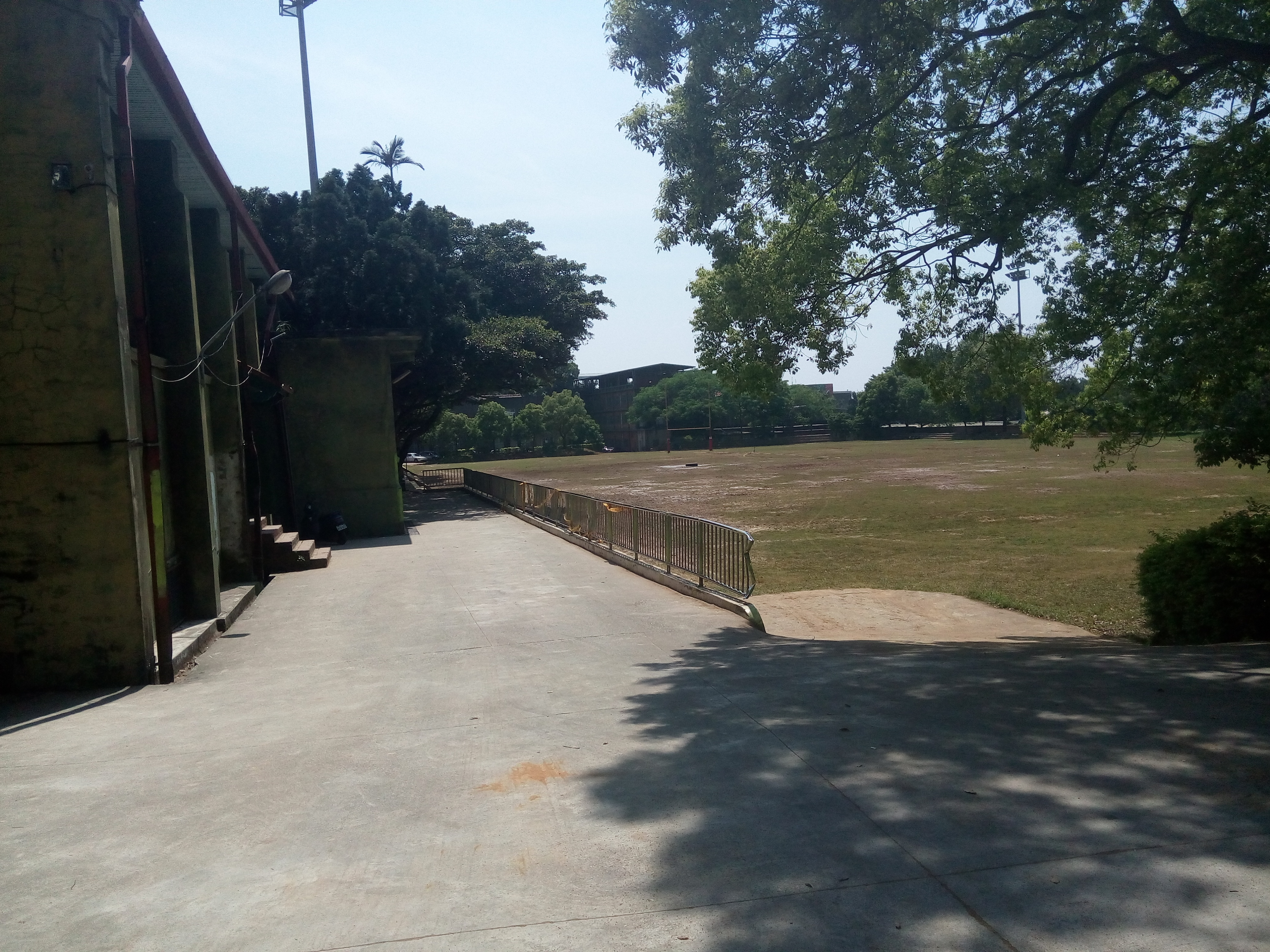 中文（台灣）: 用來介紹淡江高中